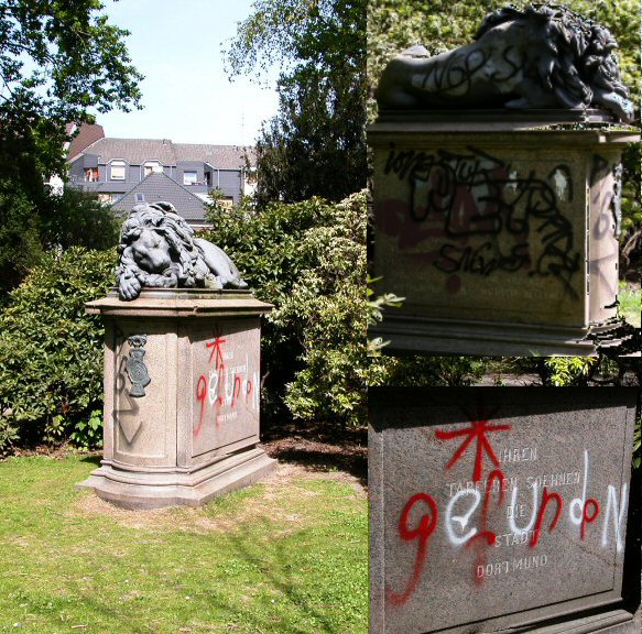 Das Kriegerdenkmal für die Gefallenen des Deutsch-Österreichischen Krieges 1866 im Westpark in Dortmund. Löwen-Skulptur 1869 von Melchior zur Straßen; Sockel 1914 von Hugo Steinbach und Paul Lutter; Standort 1914-? am westlichen Ende des Königswalls